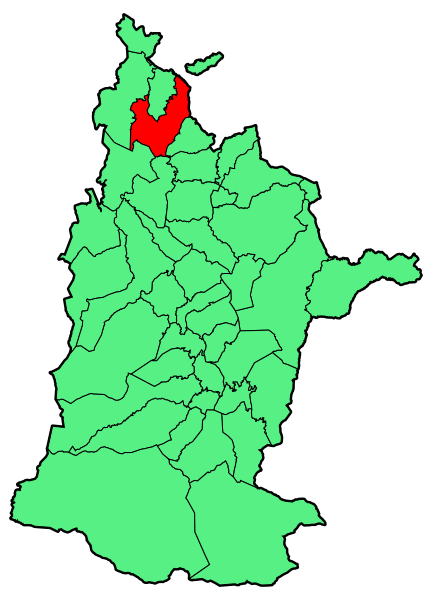 Aipaturiko udalerriaren kokapena Zuberoan